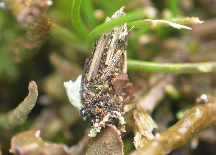 Raupe von Ptilocephala plumifera valesiella